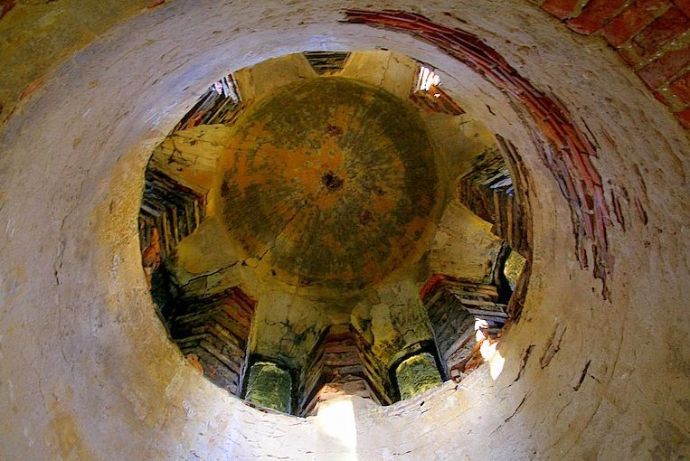 Väimela mõisa Matussaare kabel